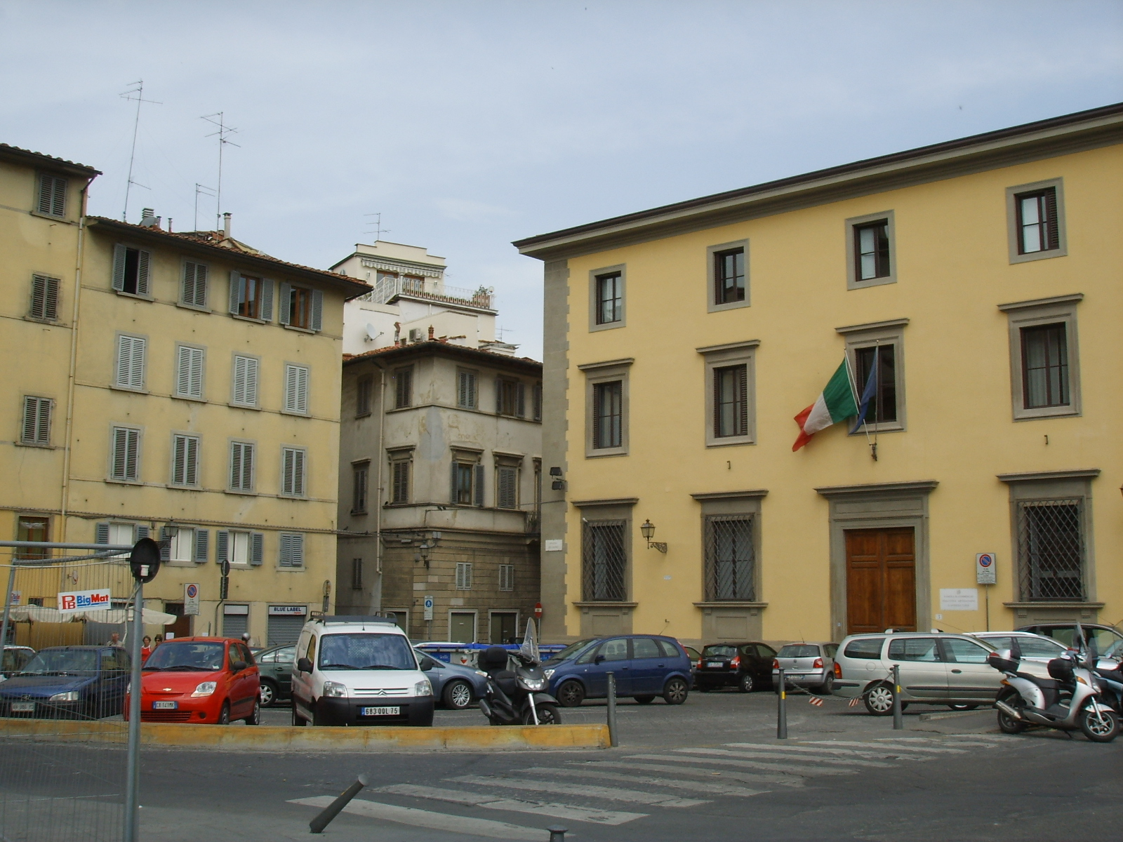 Piazza dei giudici